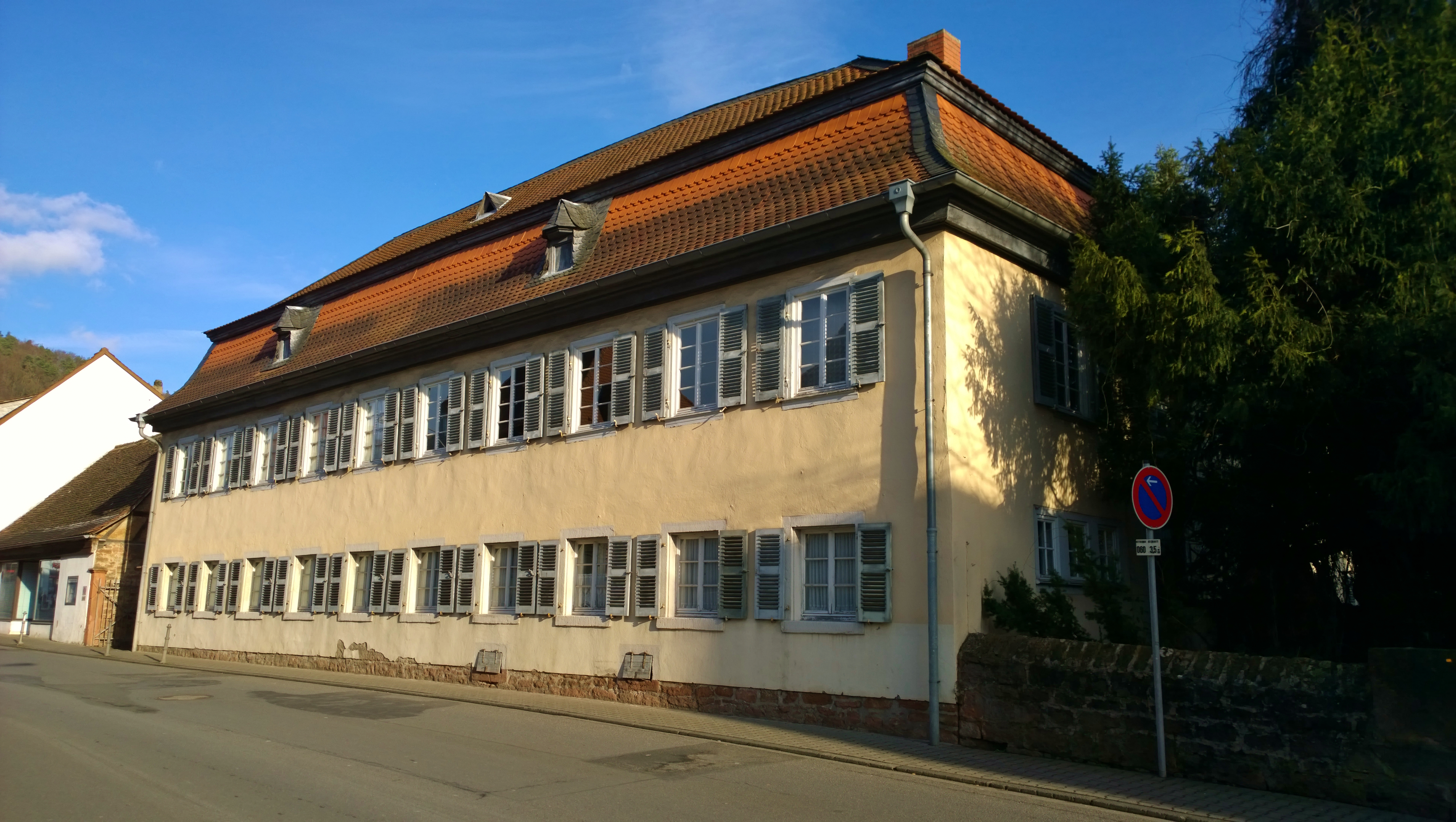 Jagdschlösschen Carlsruhe: Blick Richtung Süd mit Umfassungsmauerrest